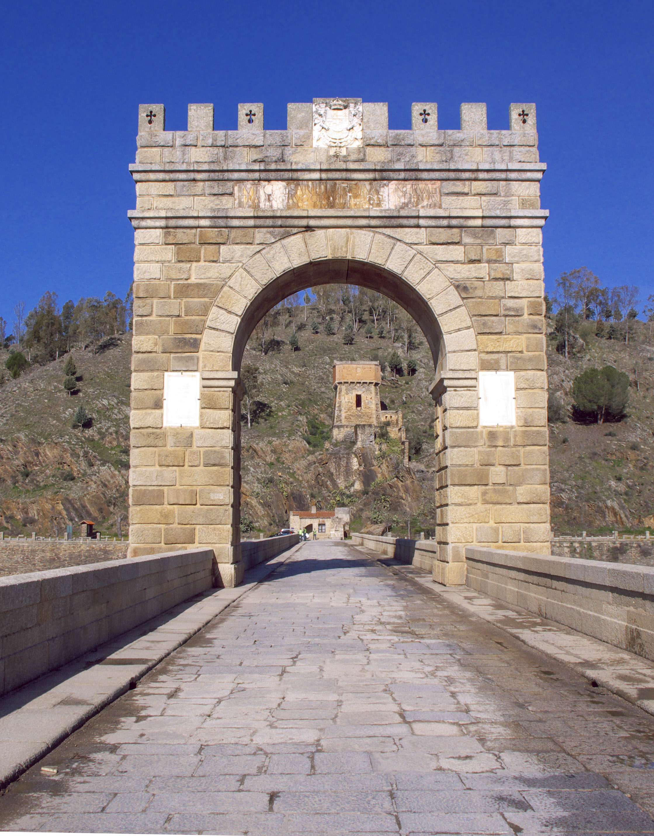 Puente de Alcántara, Cáceres. Arco (103-106) en honor al éxito de esta obra de Cayo Julio Lacer para el Emperador Trajano.